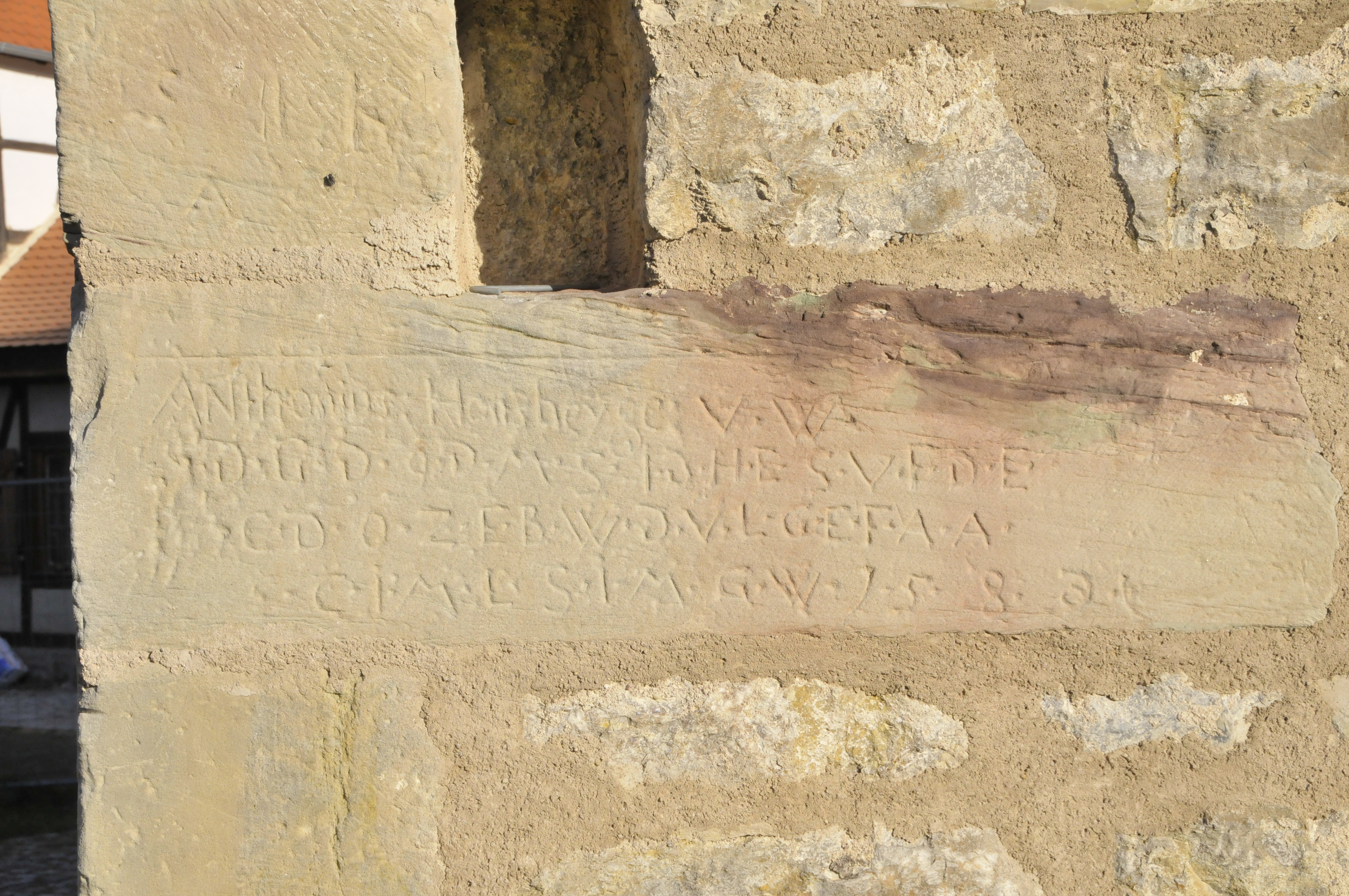 Willroda, Mauerstein an der Kapelle